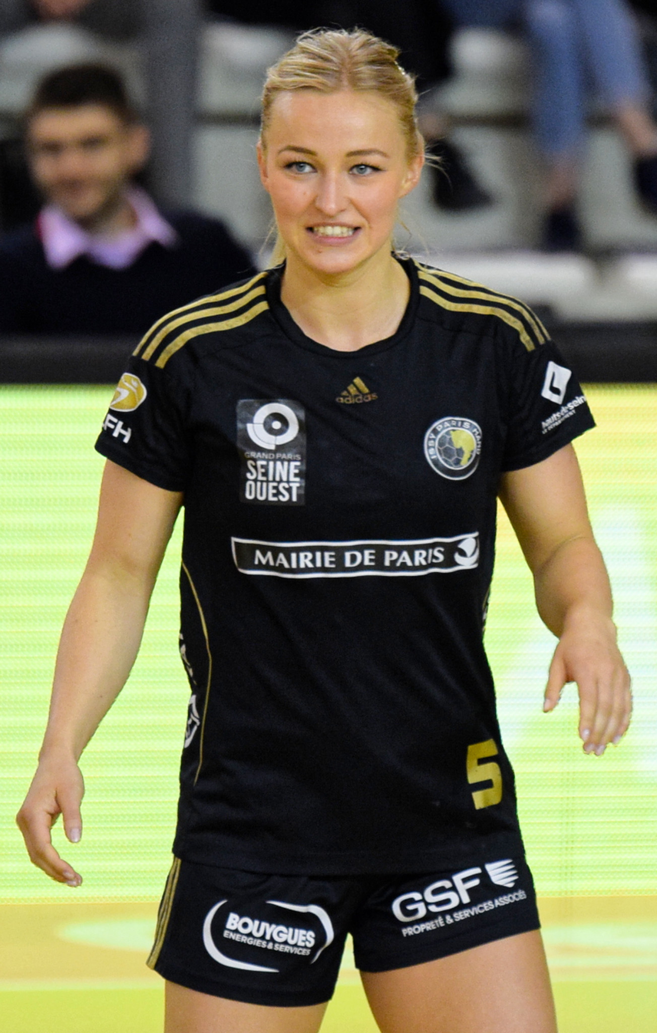 Demi-finale de LFH entre Issy Paris Hand et Brst Bretagne Handball. A Issy Les Moulineaux, le 19 mai 2017.